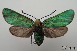 Aufnahme eines Alpen-Grünwidderchen-Weibchens, präpariert.